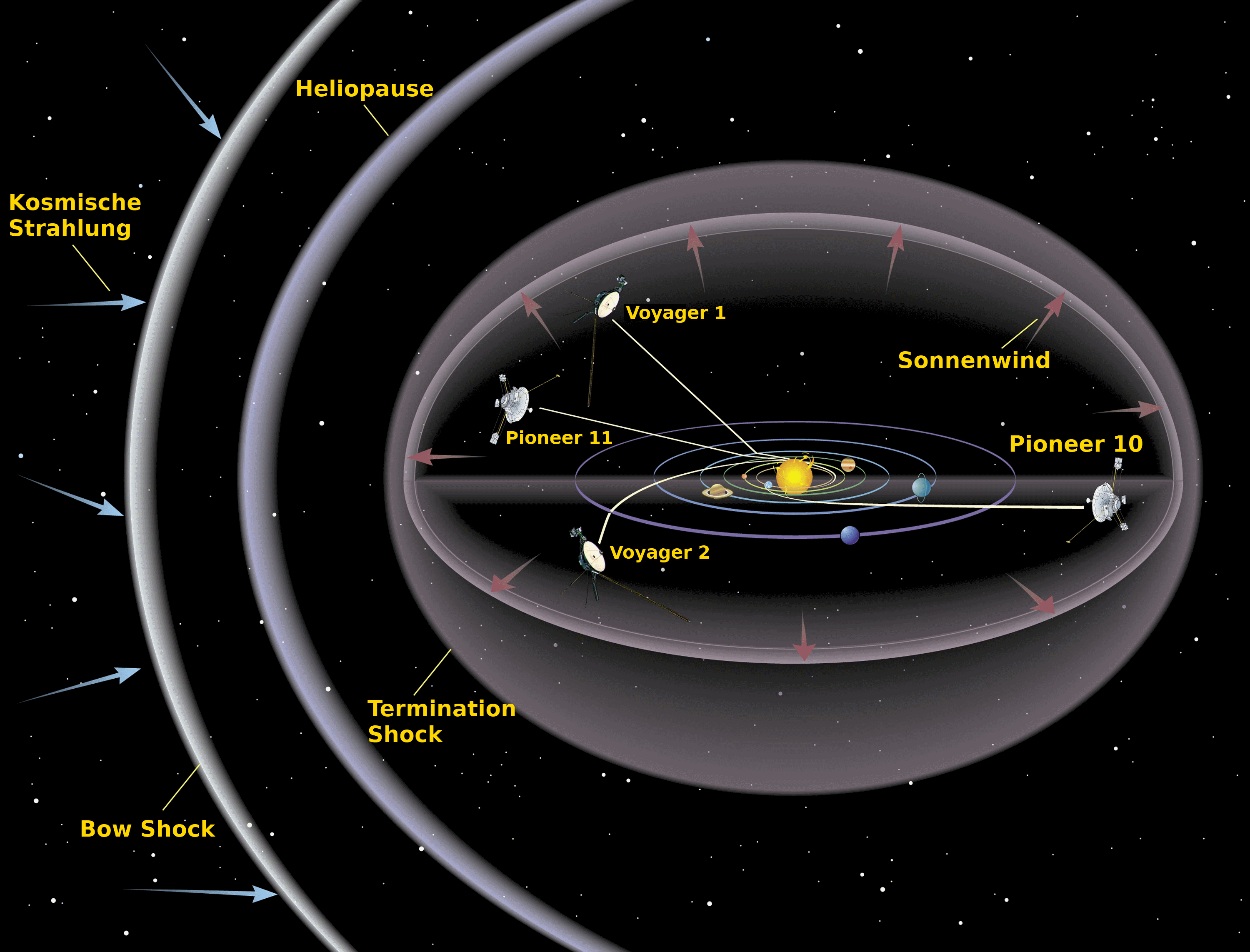 Grafische Darstellung der Heliosphäre des Sonnensystems